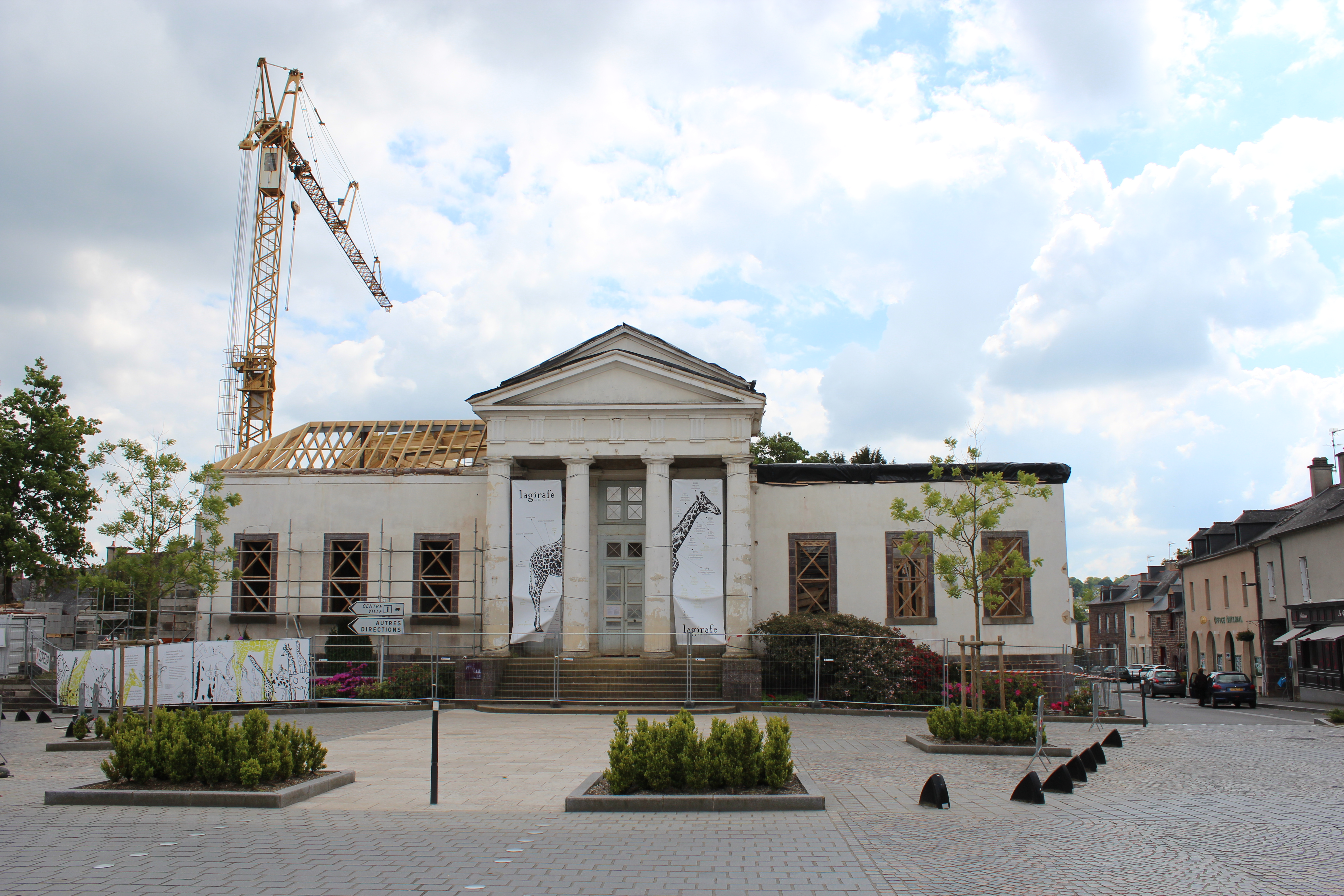 Ancien tribunal d'Instance de Montfort-sur-Meu lors de travaux de réhabilitation. Le tribunal deviendra une médiathèque.